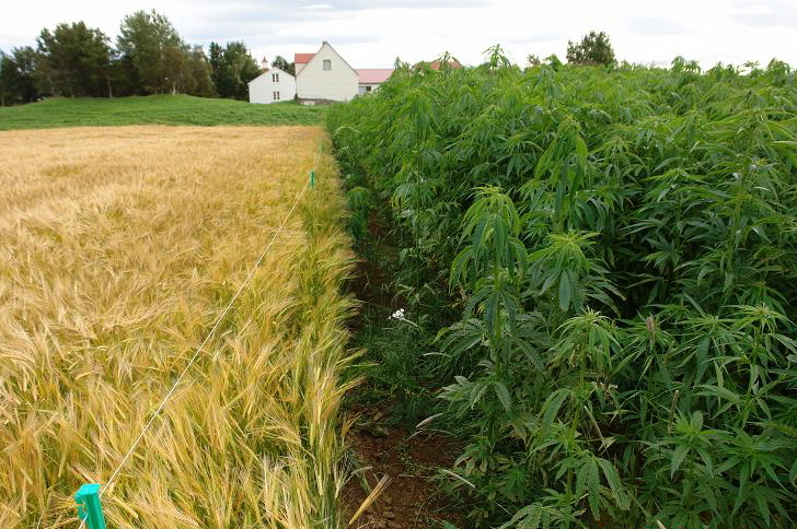 Dæmi um lífmassa, hampræktun á Möðruvöllum 2008